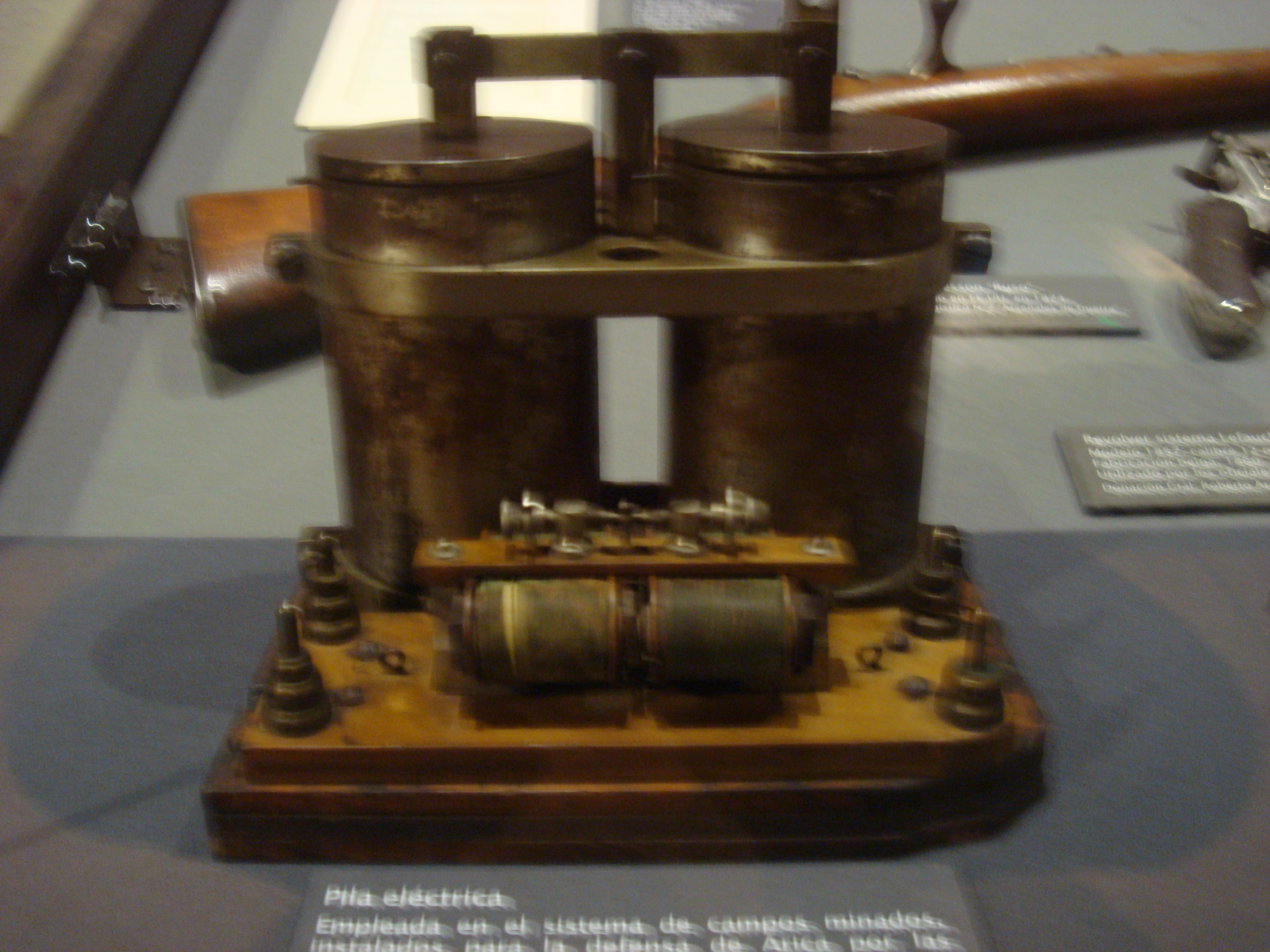 Museo historico y militar de Chile